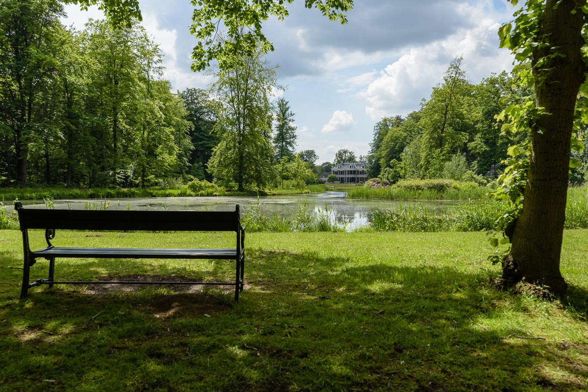 Herstelde vijver De Lindekom met zicht op Schaep en Burgh, 's-Graveland, Wijdemeren, Noord Holland, Nederland.